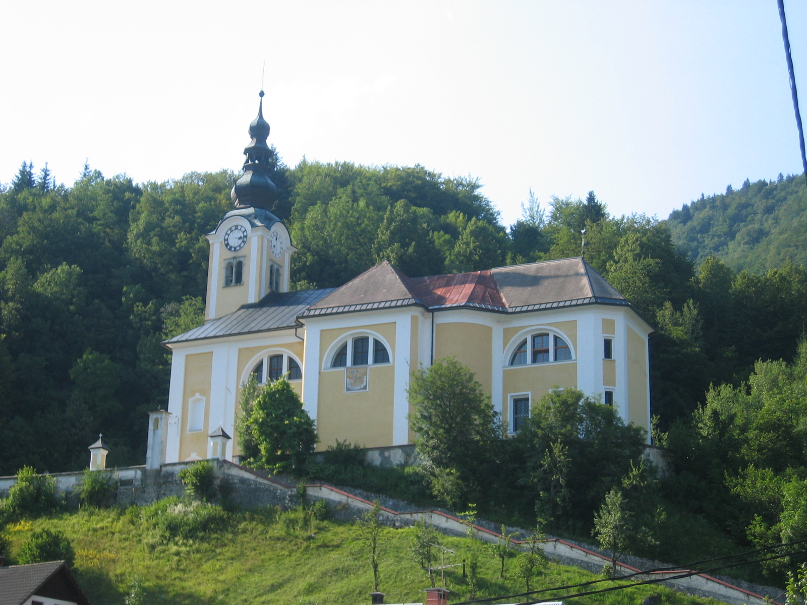 Church in Srednja vas, Bohinj, Slovenia (St. Martin)